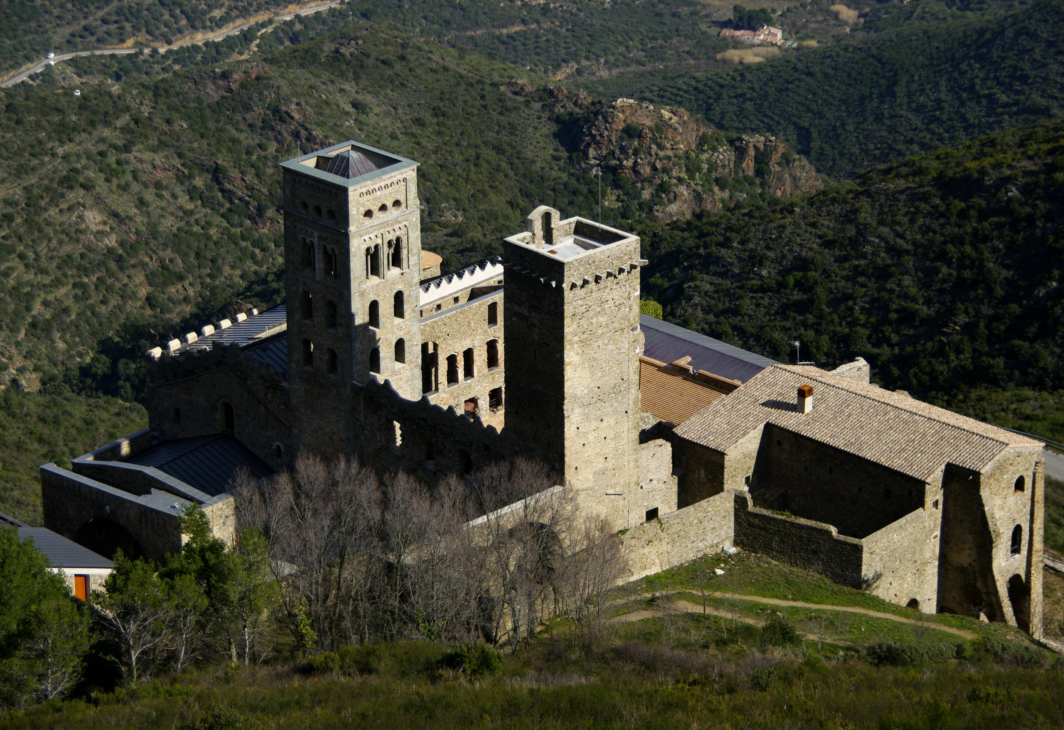 Monestir de Sant Pere de Rodes (El Port de la Selva)